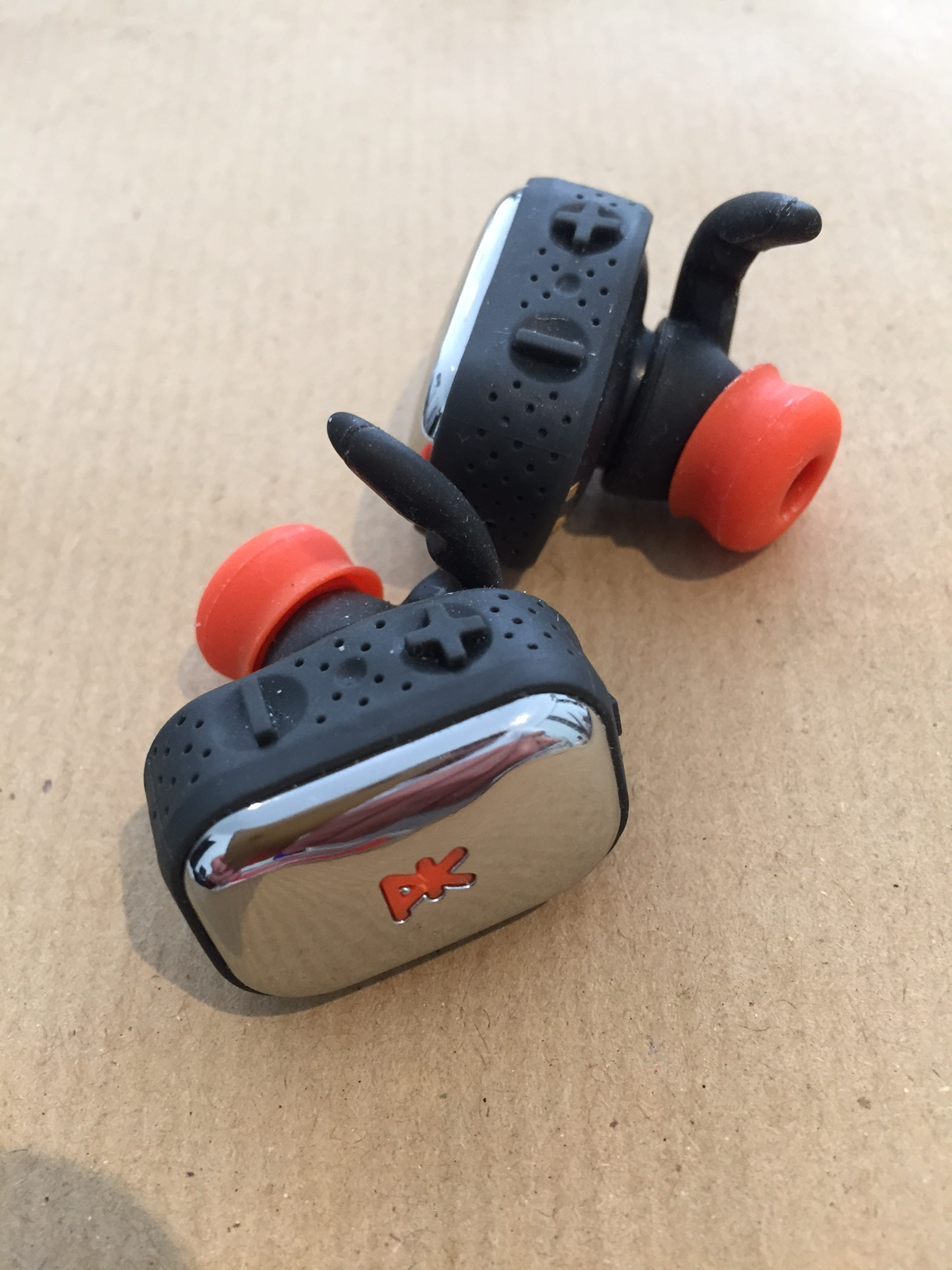 oreillettes audio sans aucun fil de PKparis